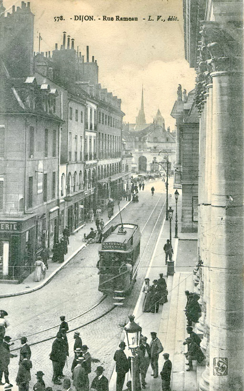 Carte postale ancienne éditée par L. V. édit, n°578 : Dijon - Rue Rameau. Vue d'une rame du Ancien tramway de Dijon-Ancien tramway de Dijon